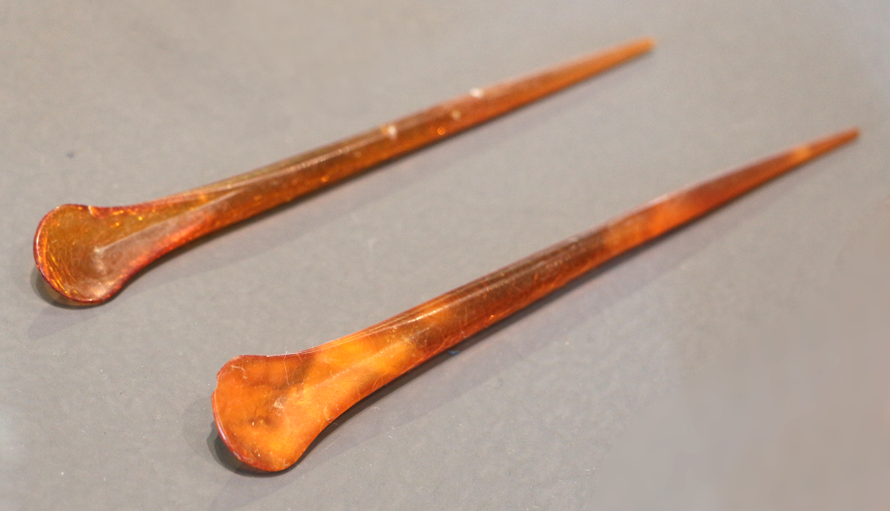 Museo Archeologico Nazionale di Aquileia This is a photo of a monument which is part of cultural heritage of Italy.